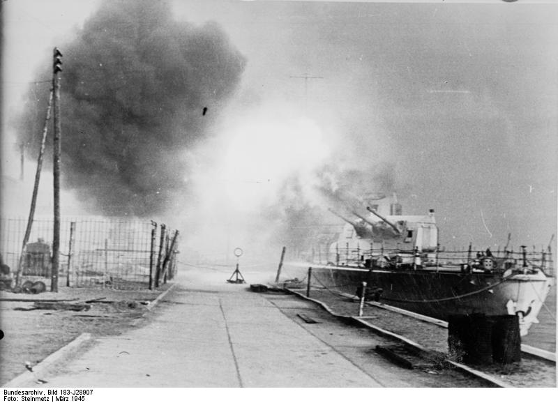 ADN-Zentralbild/ Archiv II. Weltkrieg 1939-45 Ein leichter Kreuzer der deutschen Kriegsmarine beschießt von seinem Liegeplatz im Hafen von Gdingen (poln.: Gdynia) sowjetische Panzerstellungen und Fahrzeugkolonnen. Aufnahme: Steinmetz/ Mitte März 1945 347-45 Scherl Bilderdienst Information added by Wikimedia users.